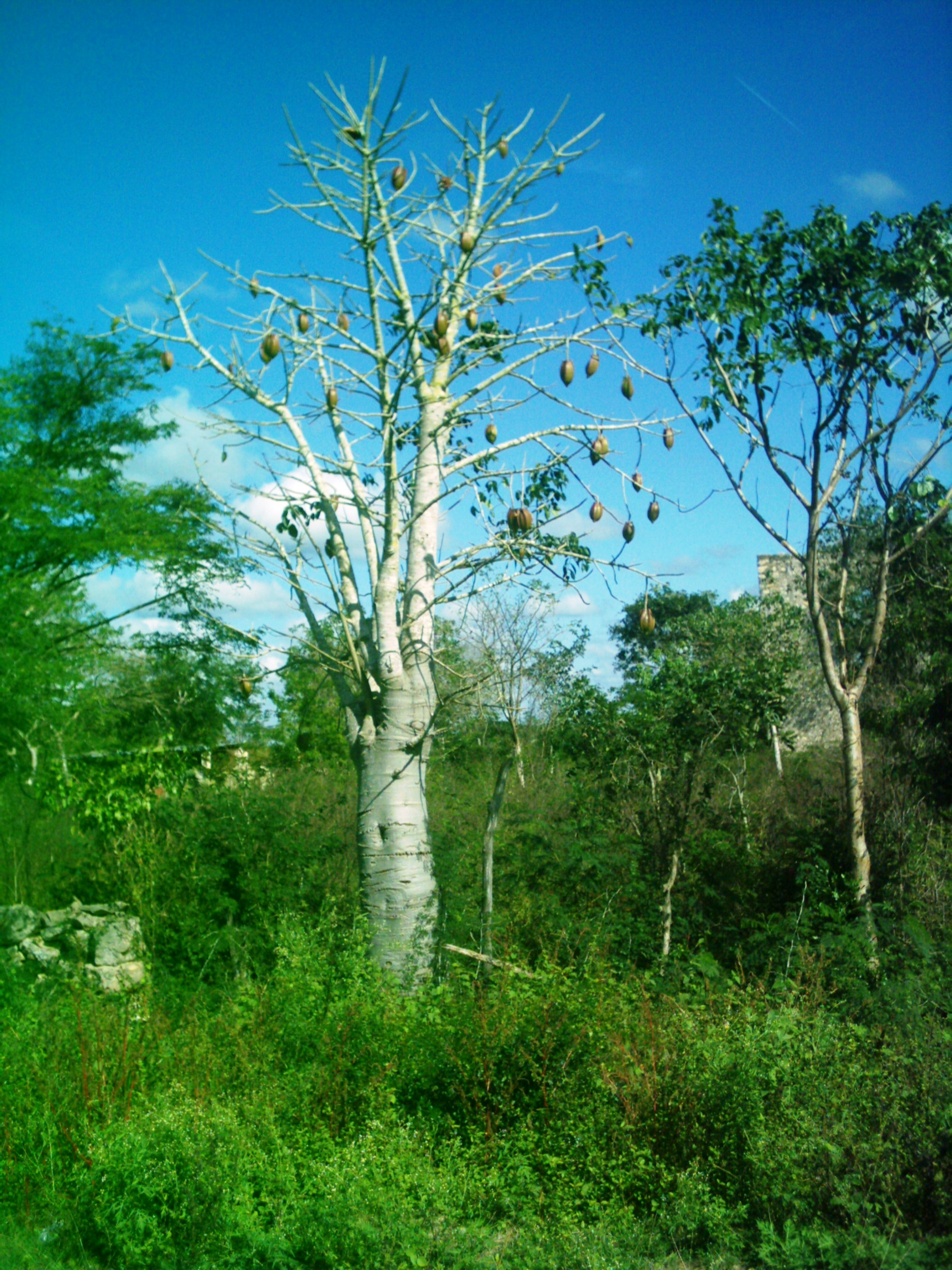 Hacienda de Kankabchén (Tixkokob), Yucatán.